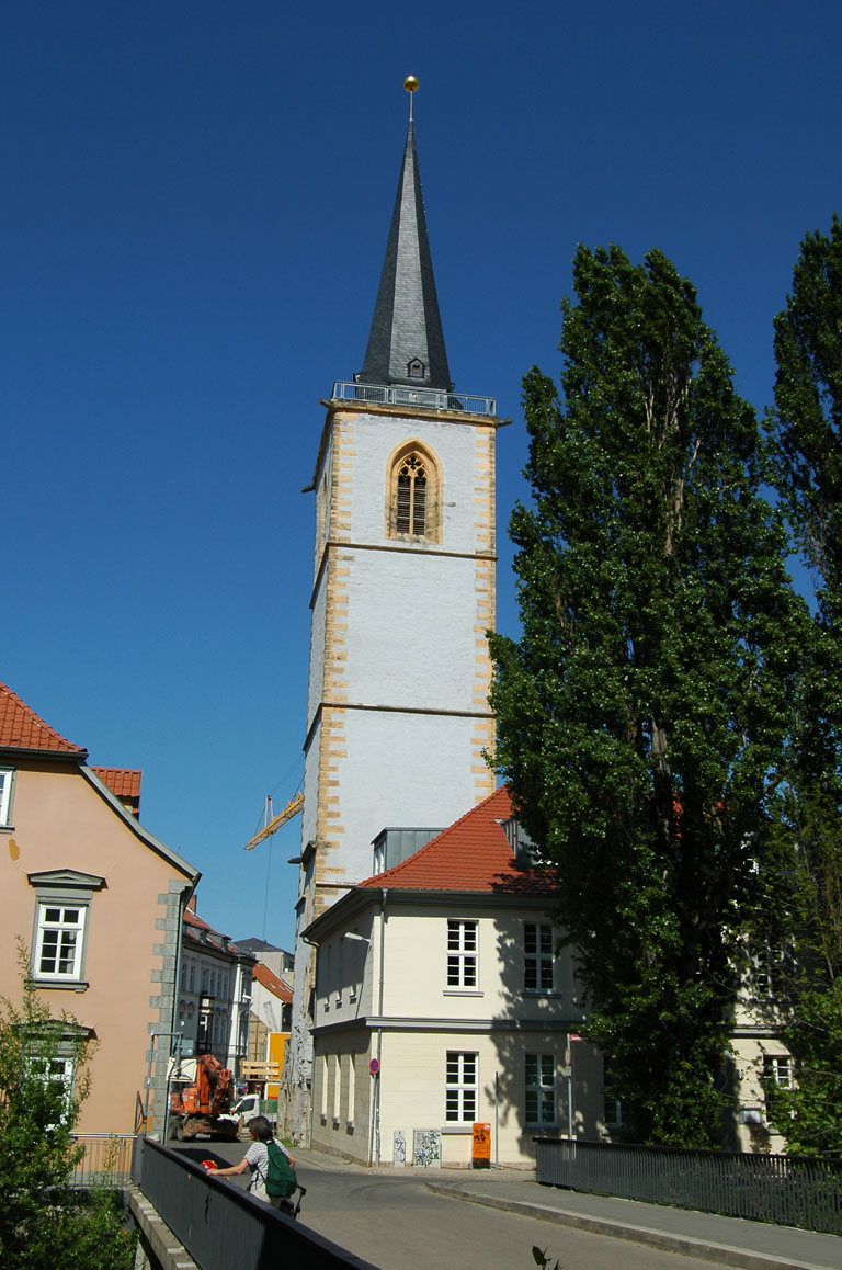 Nicolaiturm (errichtet im 13. Jahrhundert) in der Augustinerstraße in Erfurt